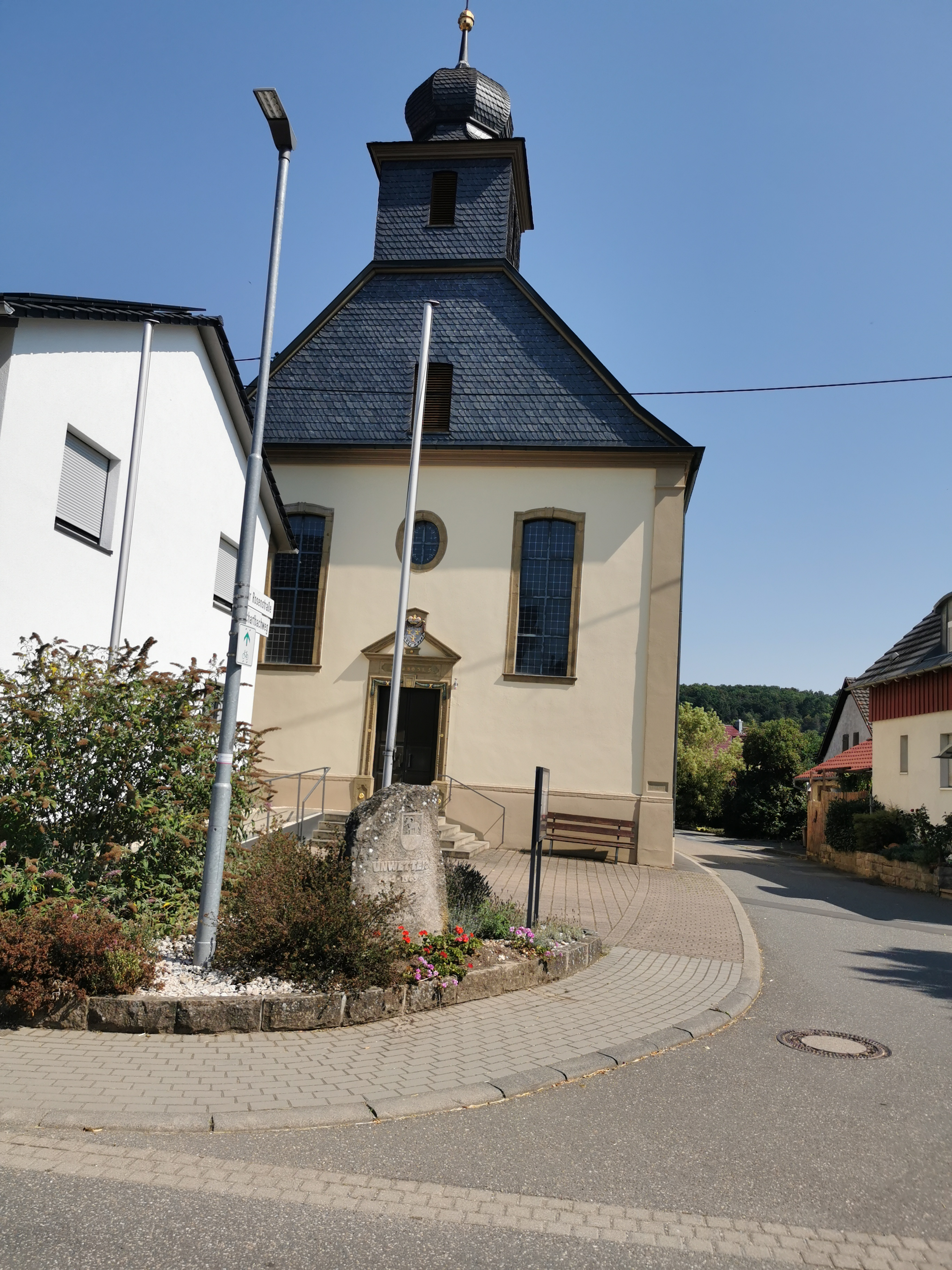 2020-08-09 Radtour in Uiffingen (Boxberg)